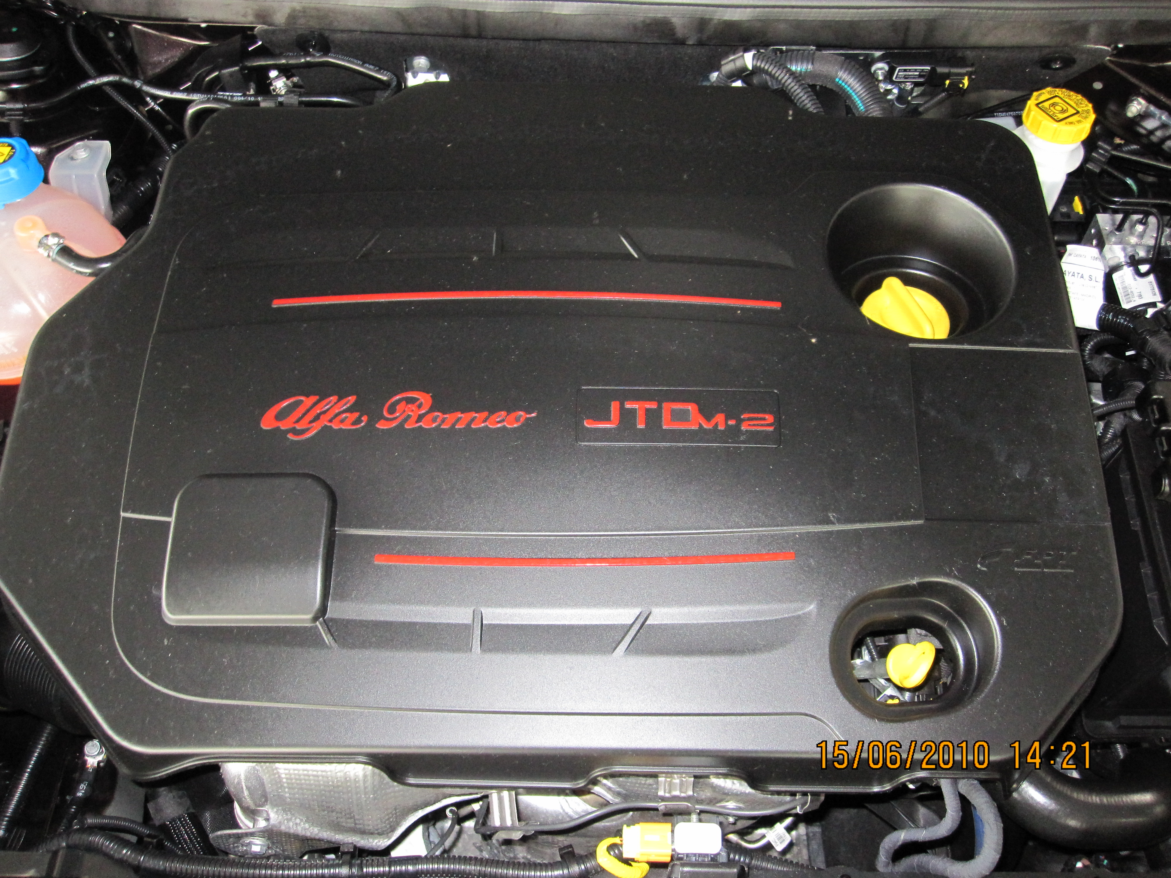 Motore Alfa Romeo JTDm-2 installato in un' Alfa Romeo Giulietta